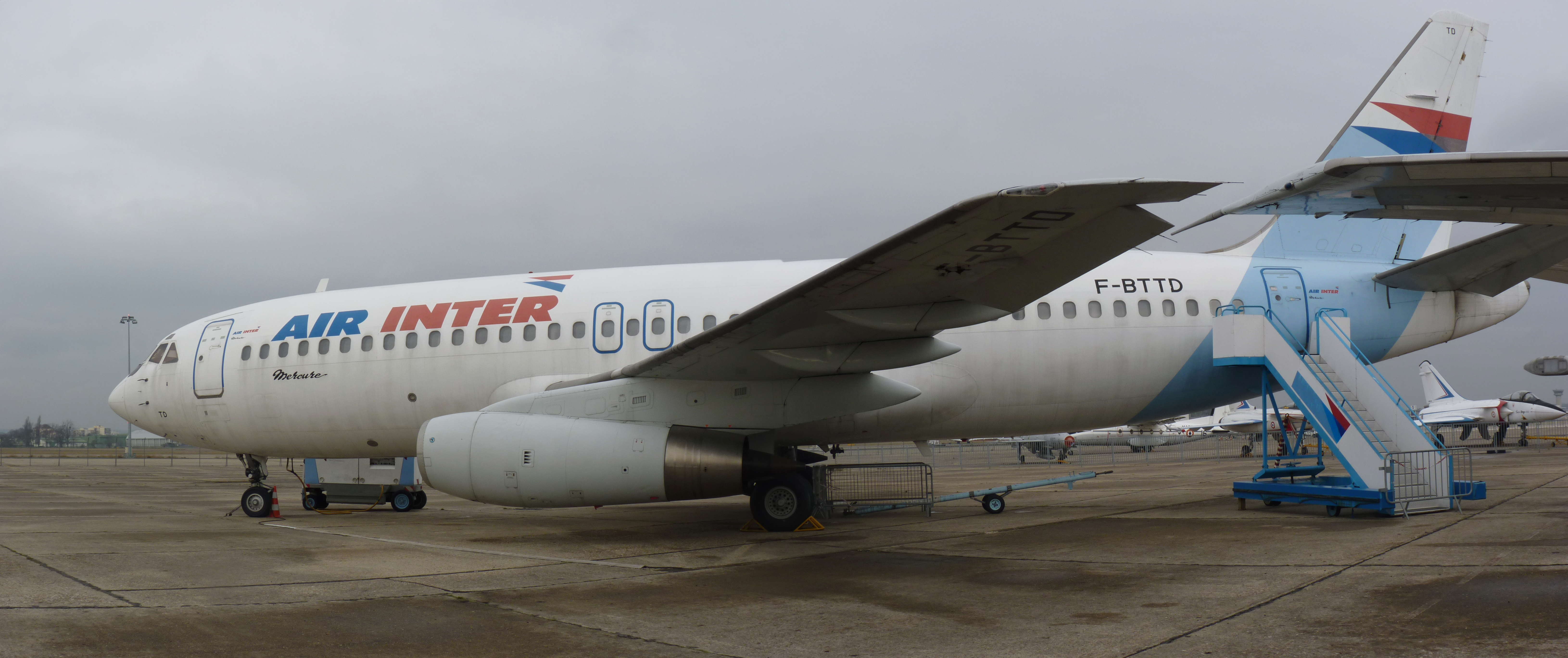 Panorama du Dassault Mercure 100 F-BTTD de Air Inter au musée de l'air et de l'espace.